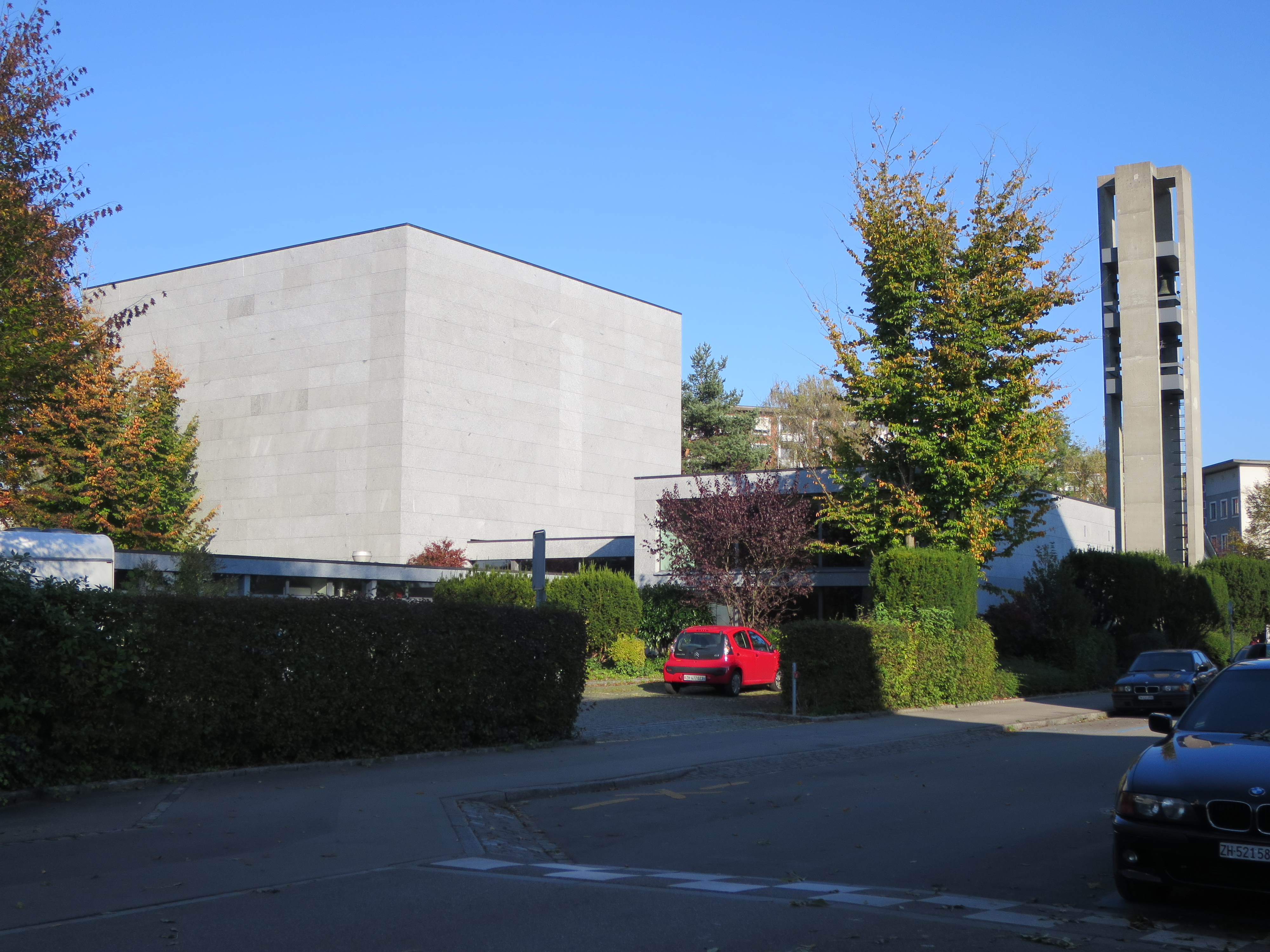 Reformierte Andreaskirche Zürich-Sihlfeld (Monolith) - Ansicht von Westen